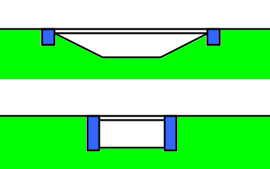 Plaatje van een hoog- en laaggefundeerd landhoofd, getekend door Wikipediagebruiker: GeeKaa 1 aug 2005 15:56 (CEST)